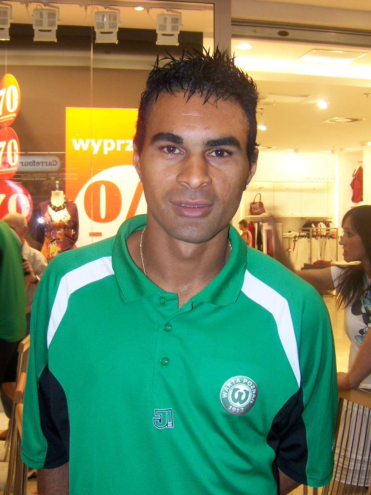 Sergio Batata podczas prezentacji Warty Poznań przed sezonem 2008/2009.